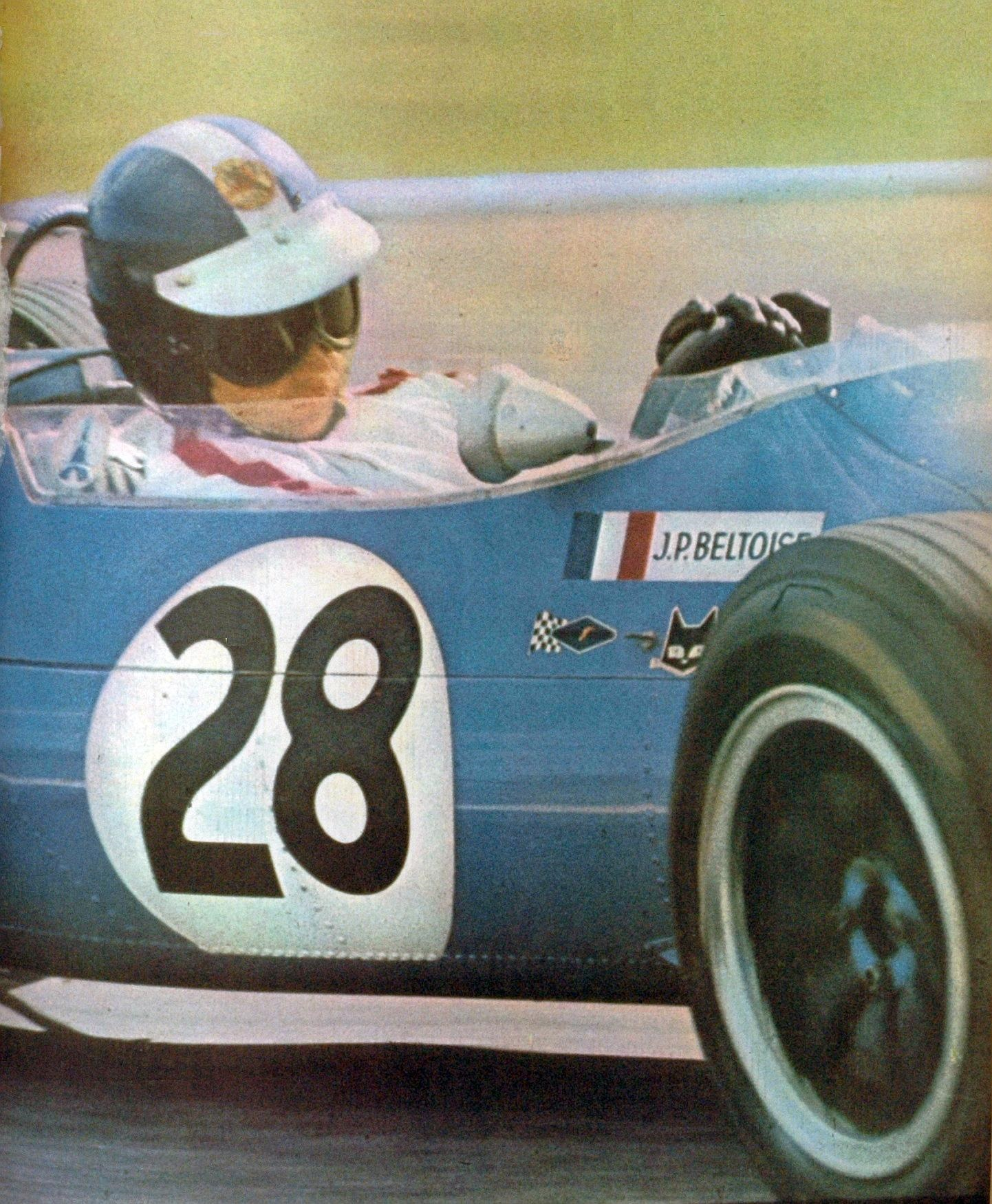 Beltoise - El Gráfico 2471 - 14 de Febrero de 1967.